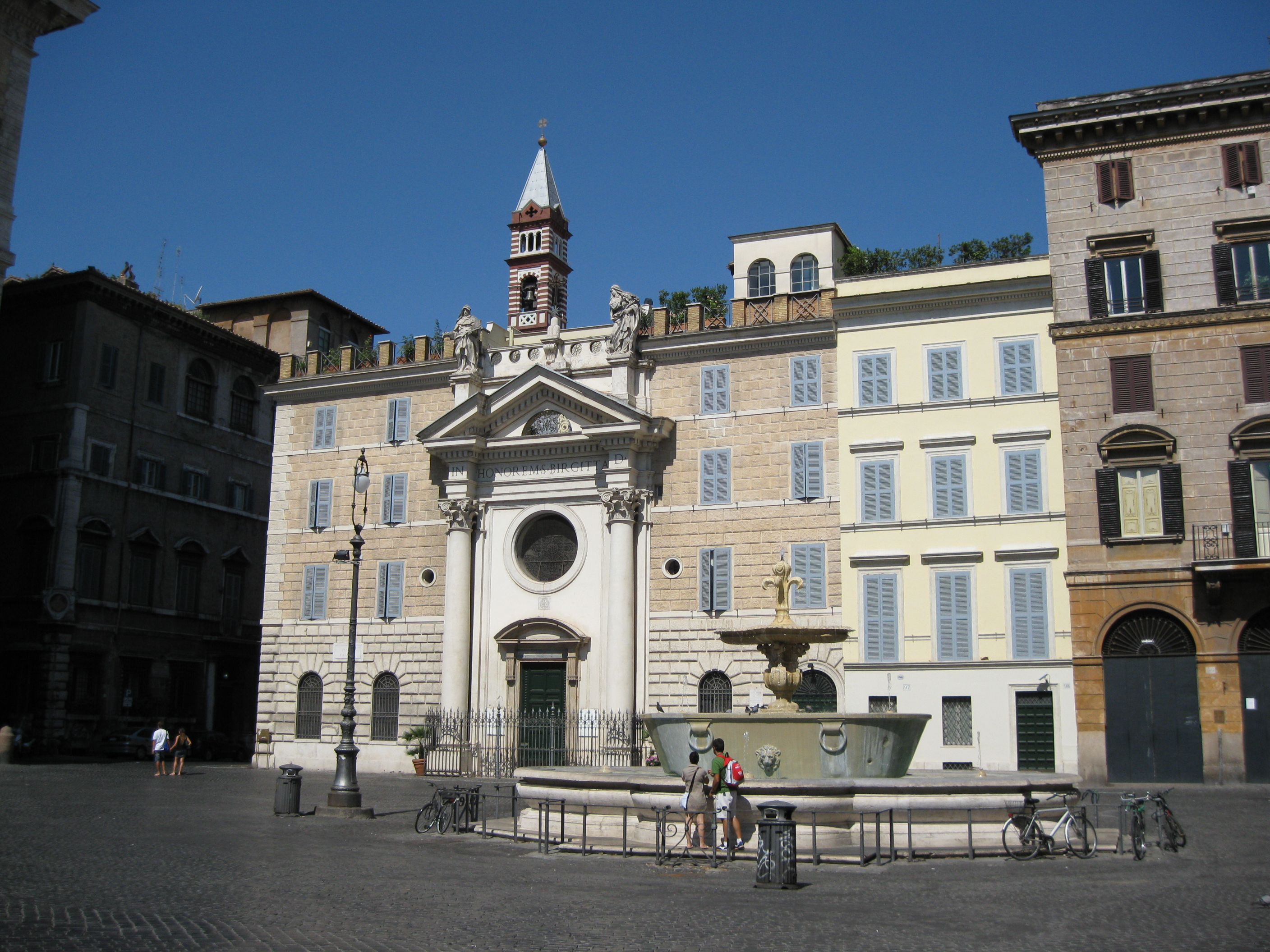 Chiesa di Santa Brigida, a Roma, in piazza Farnese.